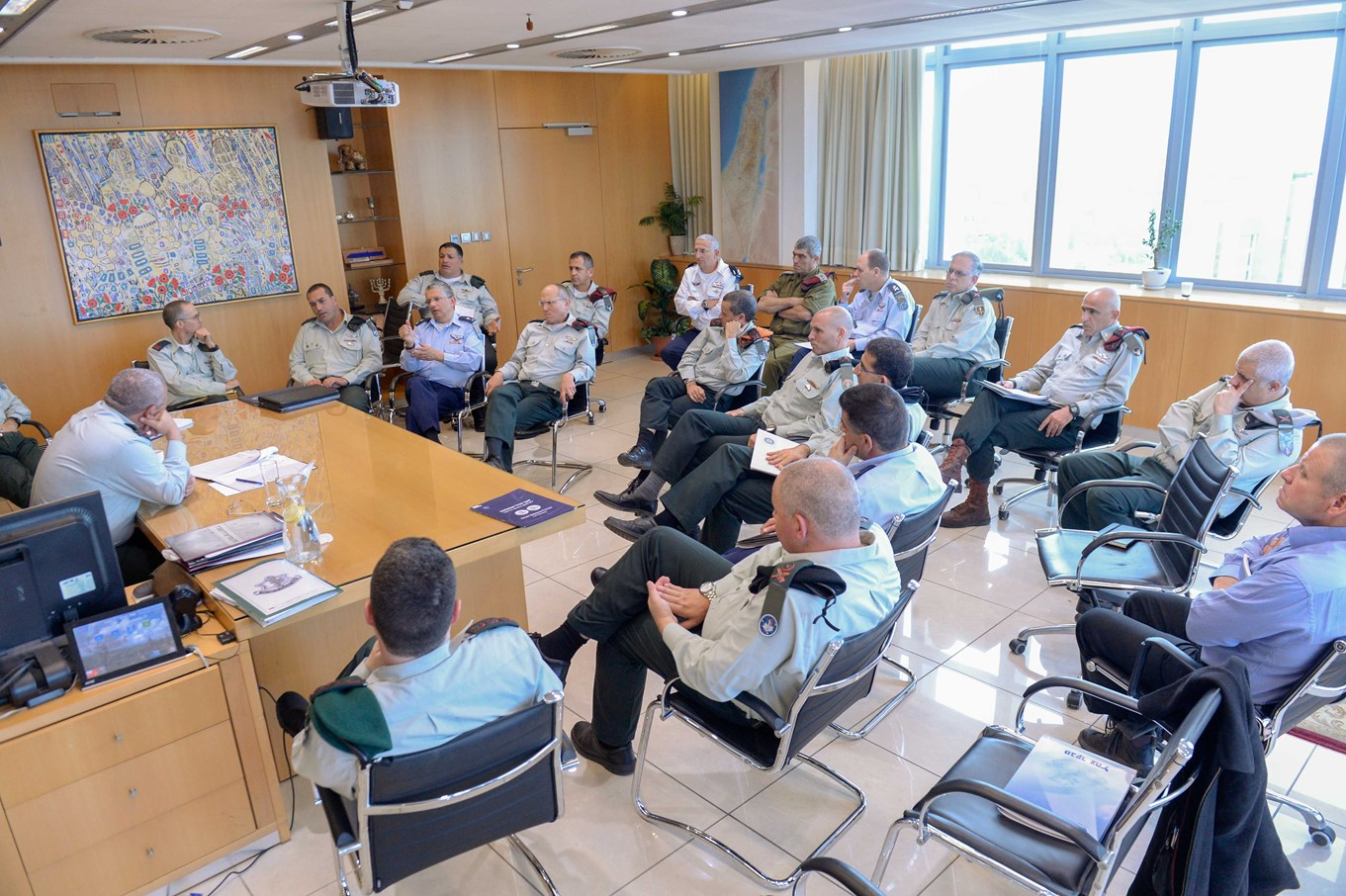 ישיבת פורום המטה הכללי במשרדו של הרמטכ"ל, רא"ל גדי איזנקוט